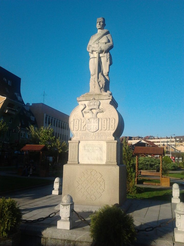 Споменик палим ратницима 1912-1918., данас би и овај камен сузу пустио